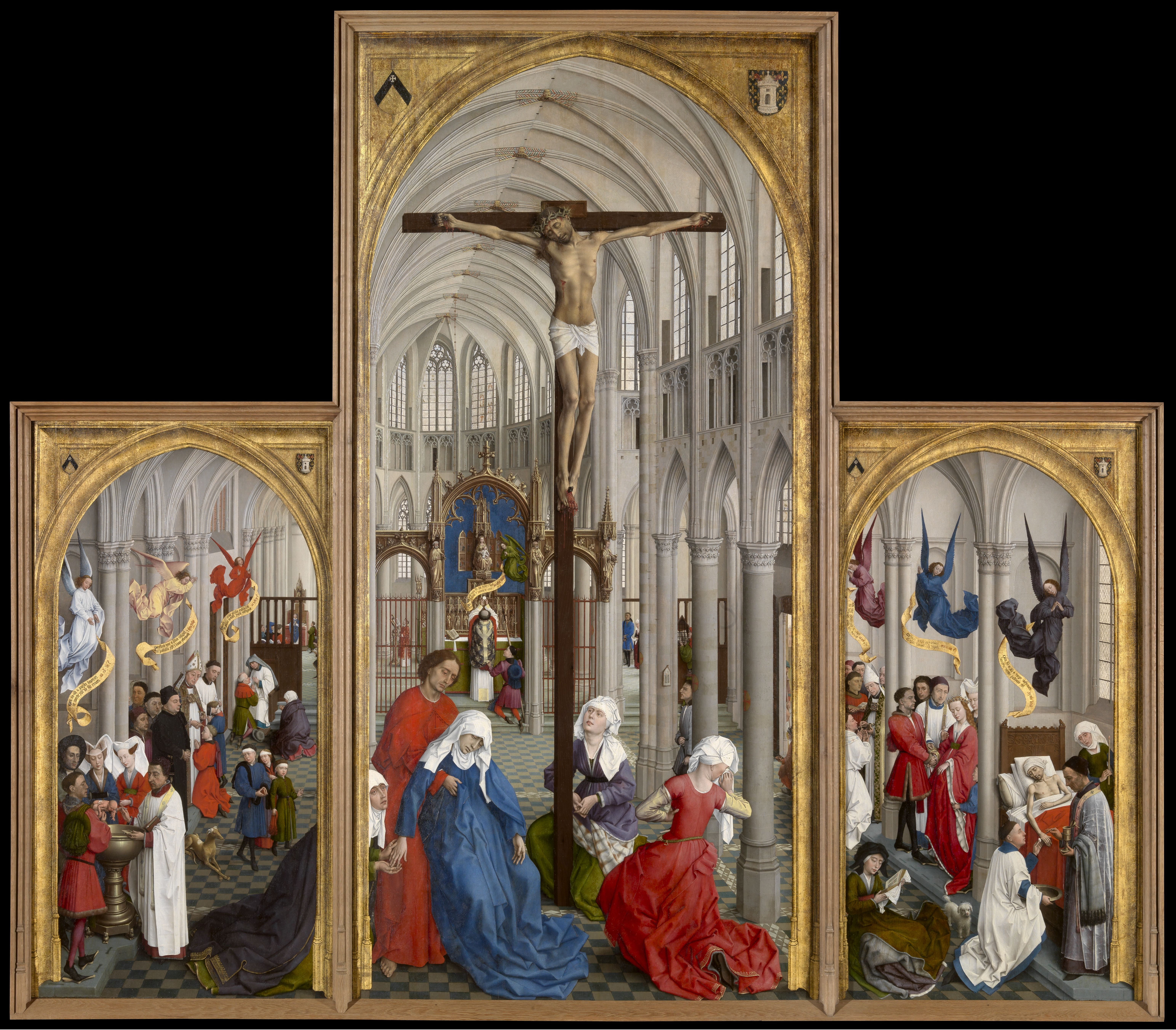 schilderij ( Rogier van der Weyden( koninklijk museum voor schone kunsten antwerpen